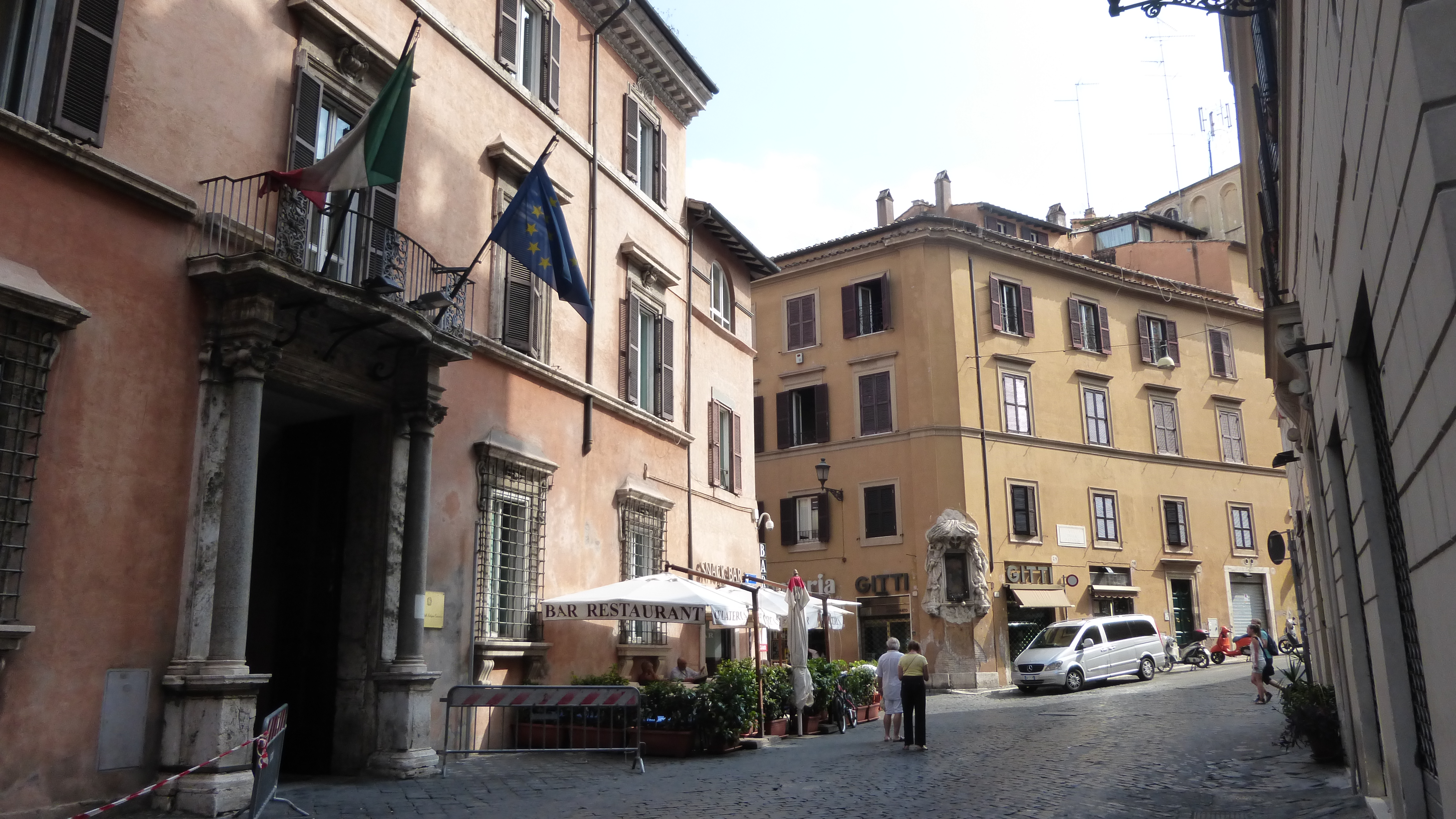 Roma, largo Pietro di Brazzà verso via della Dataria